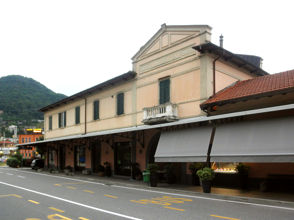 Ex stazione ferroviaria di Ponte Tresa della linea Ponte Tresa-Luino